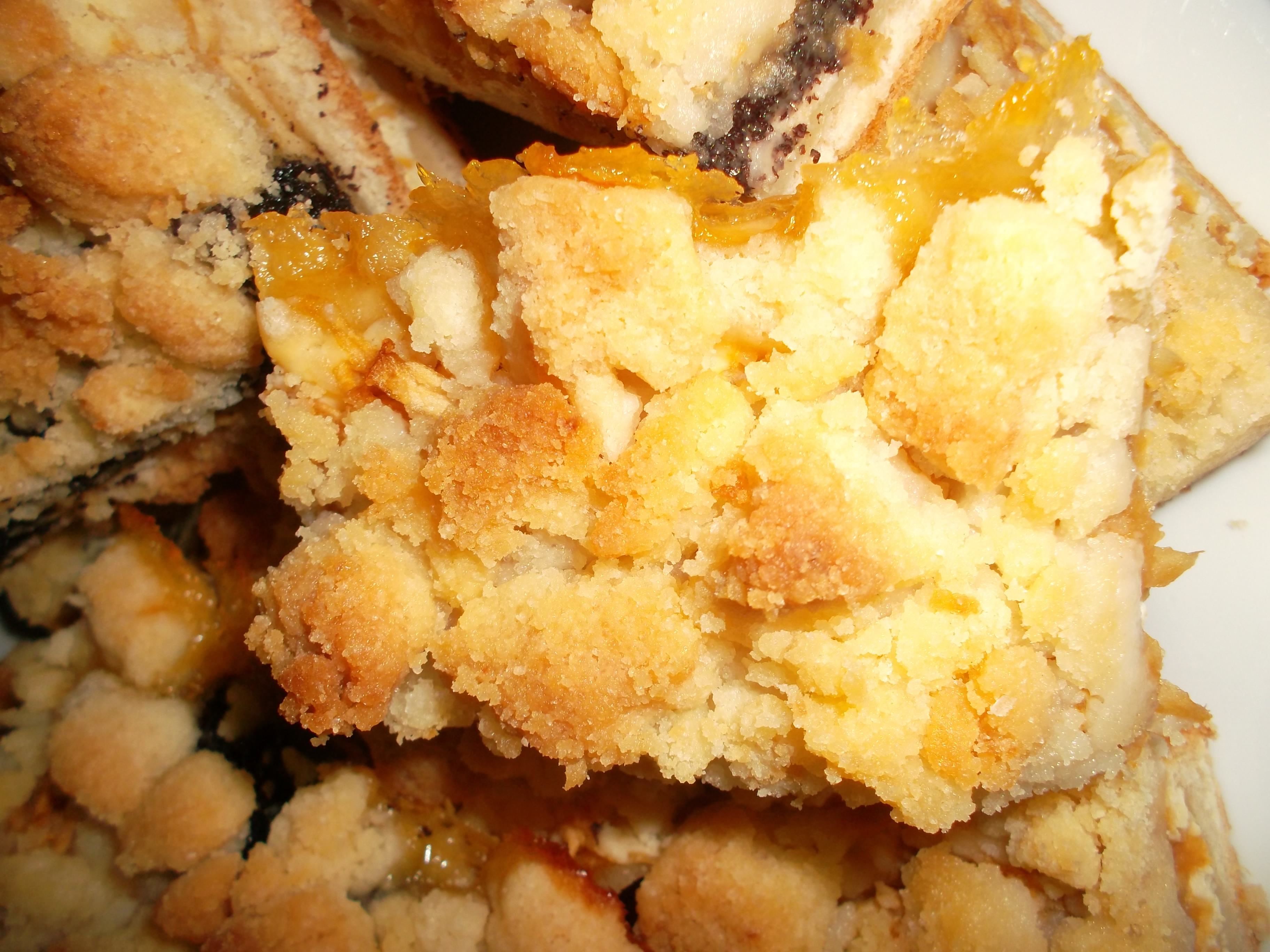 Streuselkuchen auf einen Teller